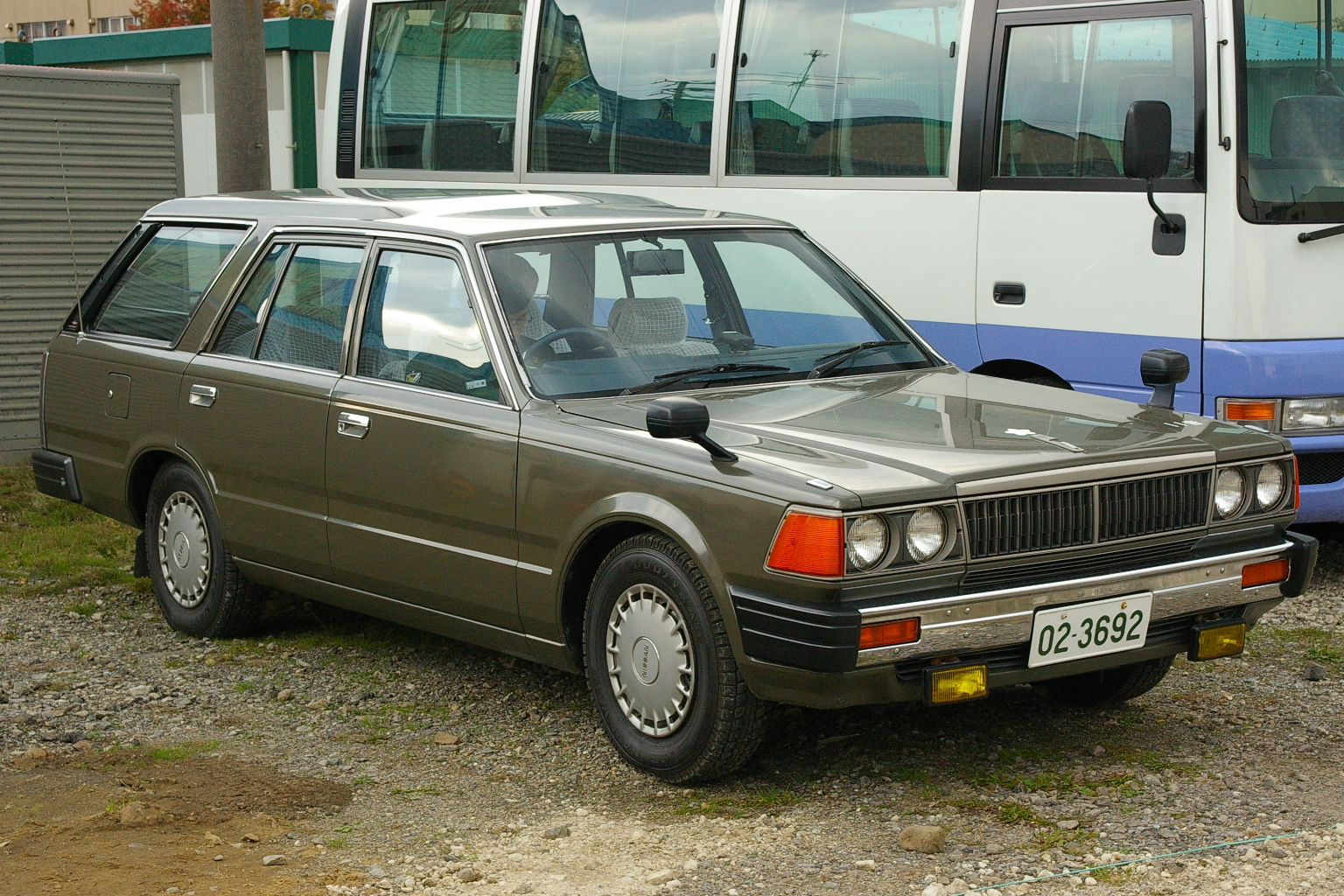 JGSDF Gyoumusha 1go (multi purpose).